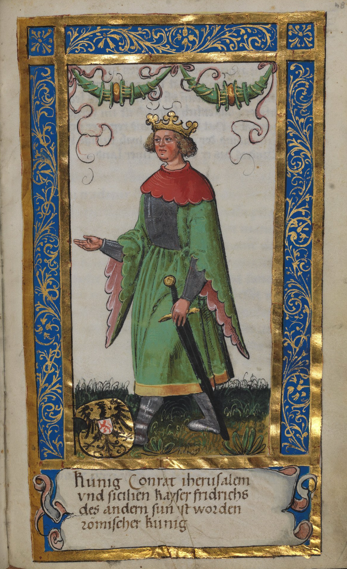 Weingartener Stifterbüchlein, Württembergische Landesbibliothek Stuttgart, Cod.hist.qt.584, fol. 48r, Stifterbild König Konrad IV. Künig Conrat iherusalem vnd sicilien kayser fridrichs des andern sun ist worden römischer könig